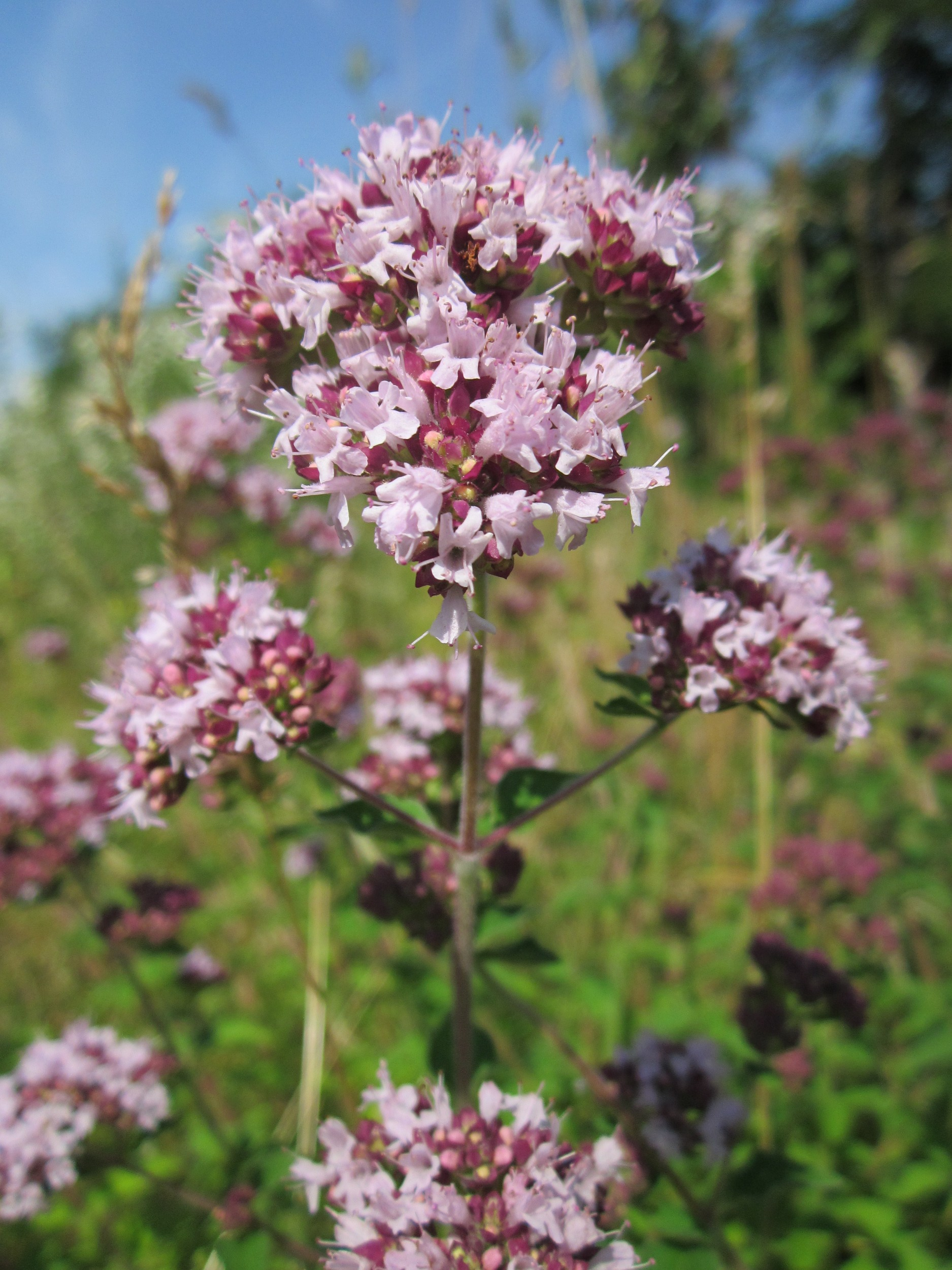 Oregano (Origanum vulgare) im Schwetzinger Hardt